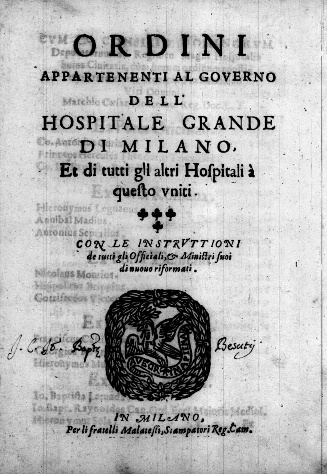 Frontespizio